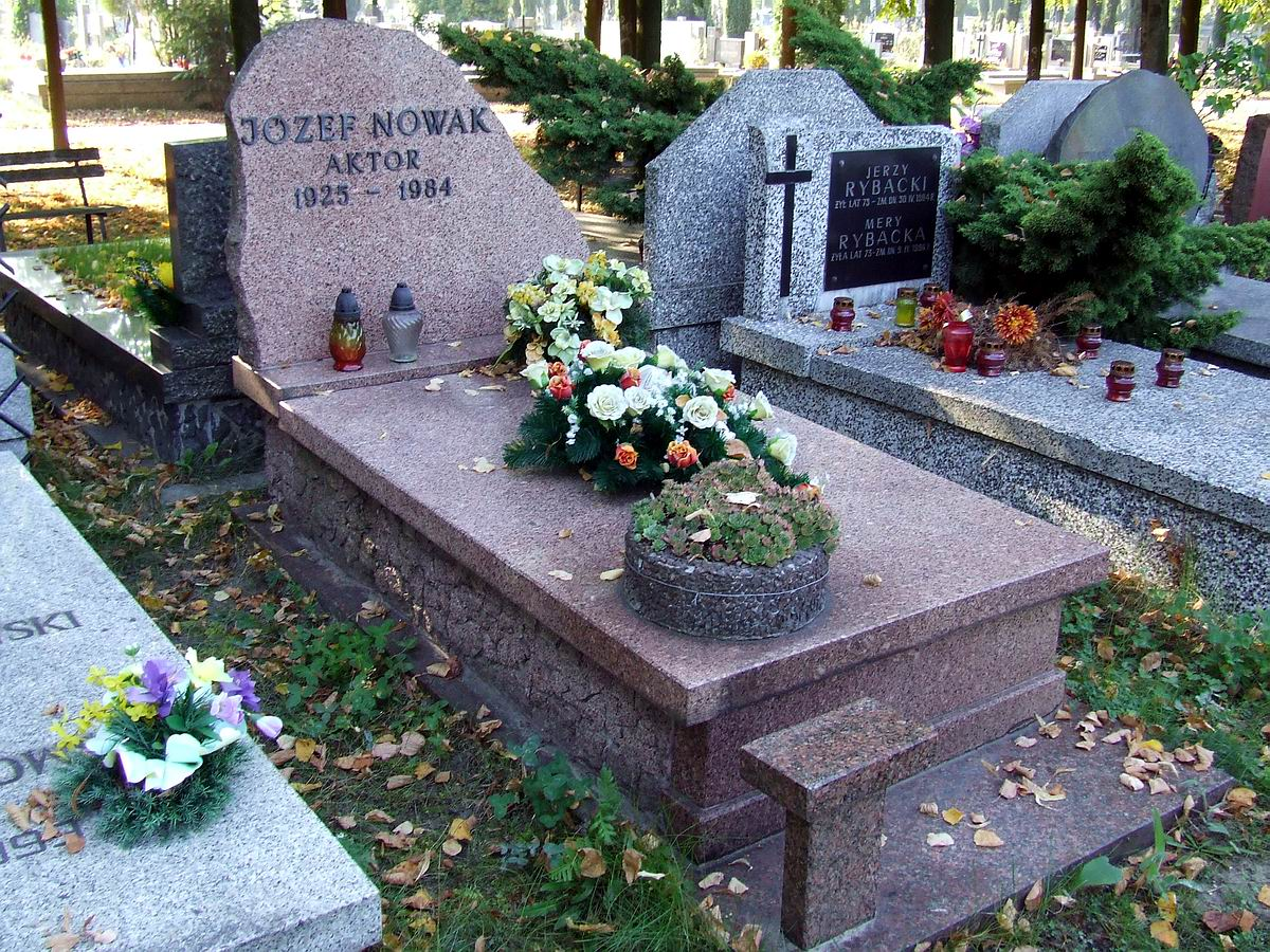 Grób Józefa Nowaka na cmentarzu na Wólce.